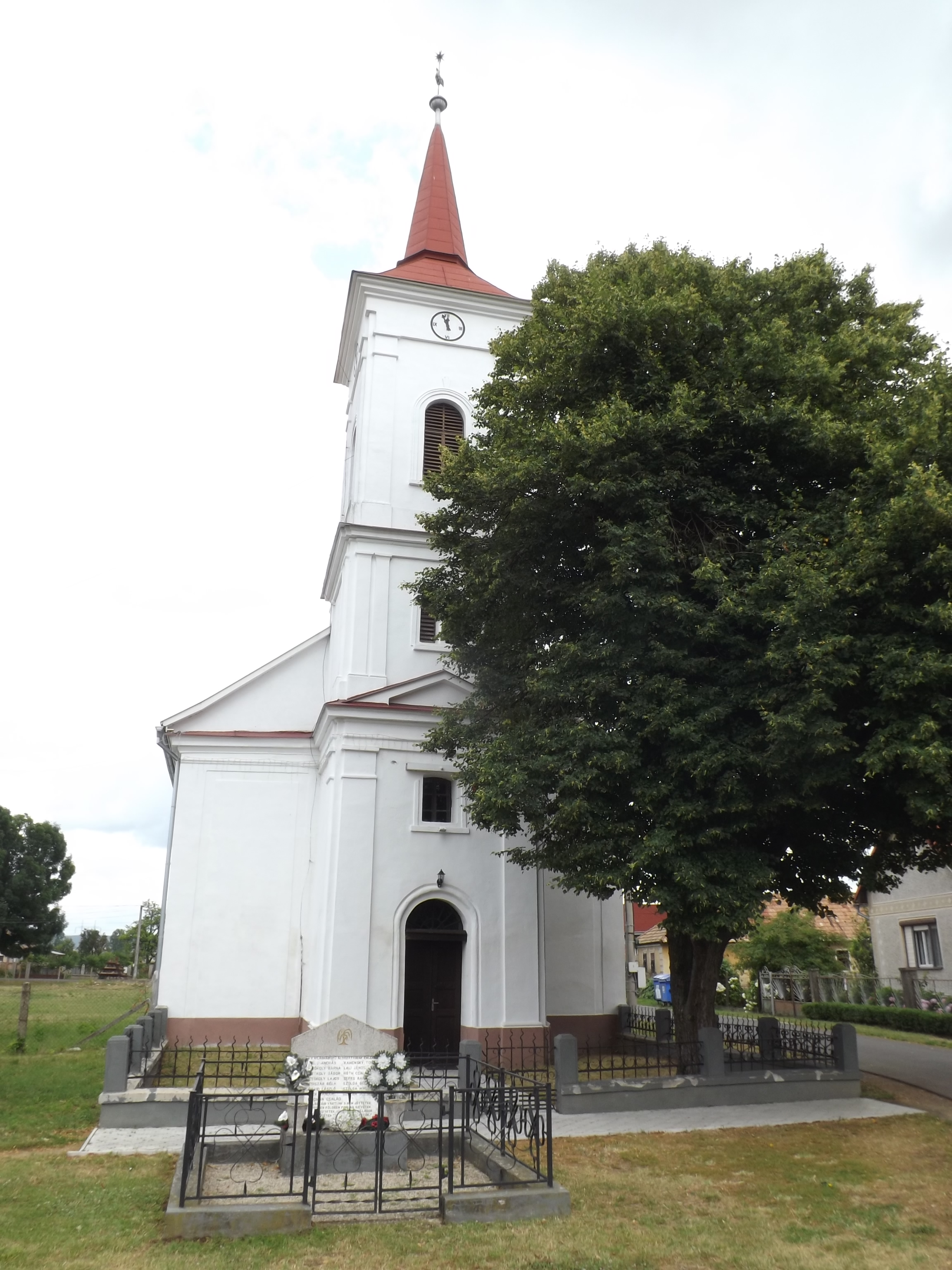 Kostol reformovanej cirkvi v obci Rumince, okres Rimavská Sobota